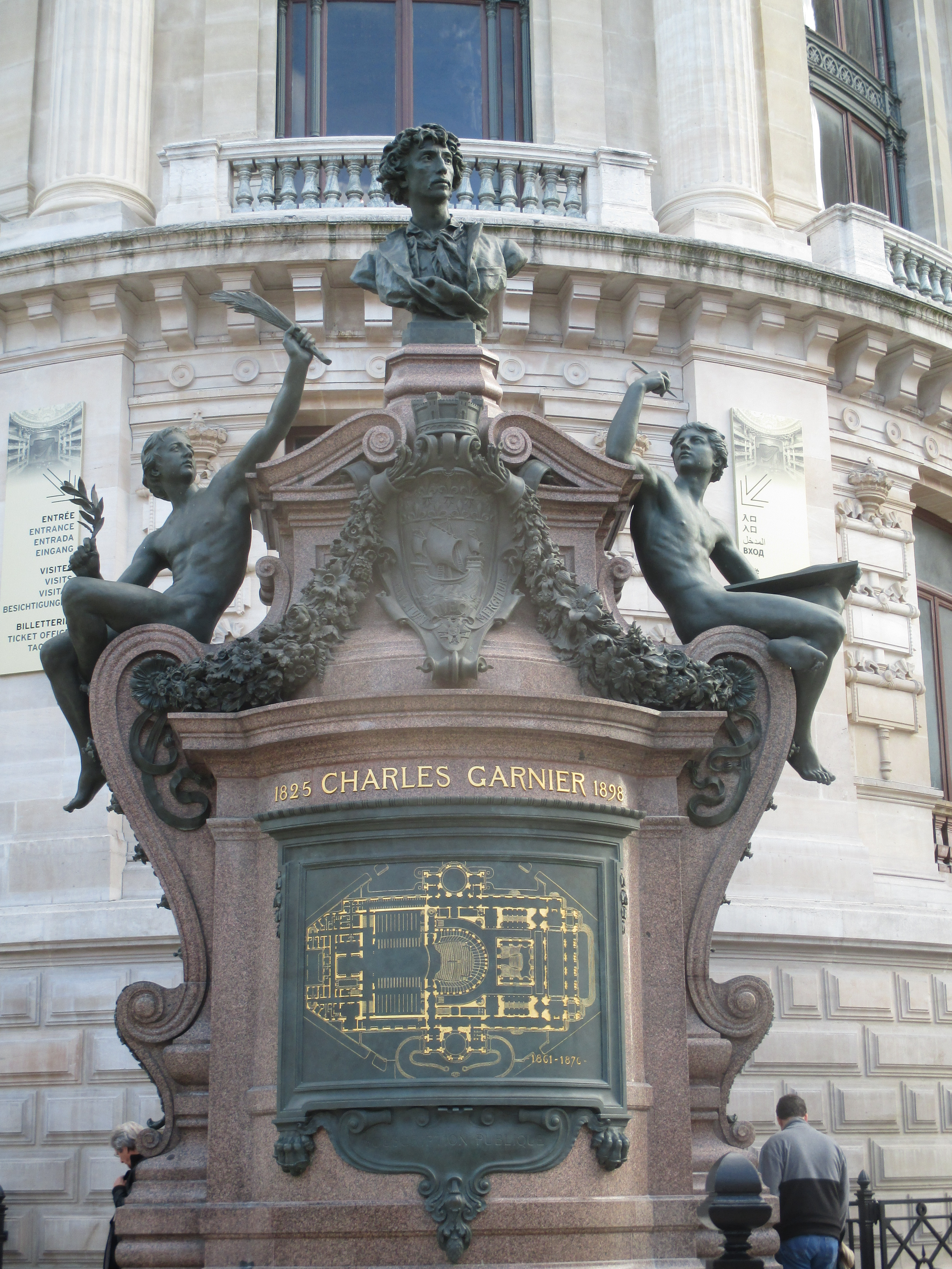 Monument de Charles Garnier derrière l'Opéra.